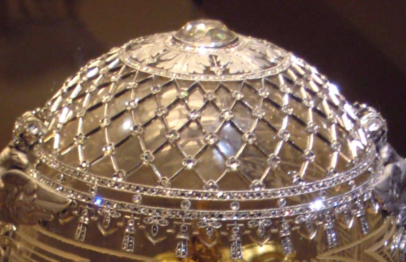 Яйцо Фаберже "Конный памятник Александру III"